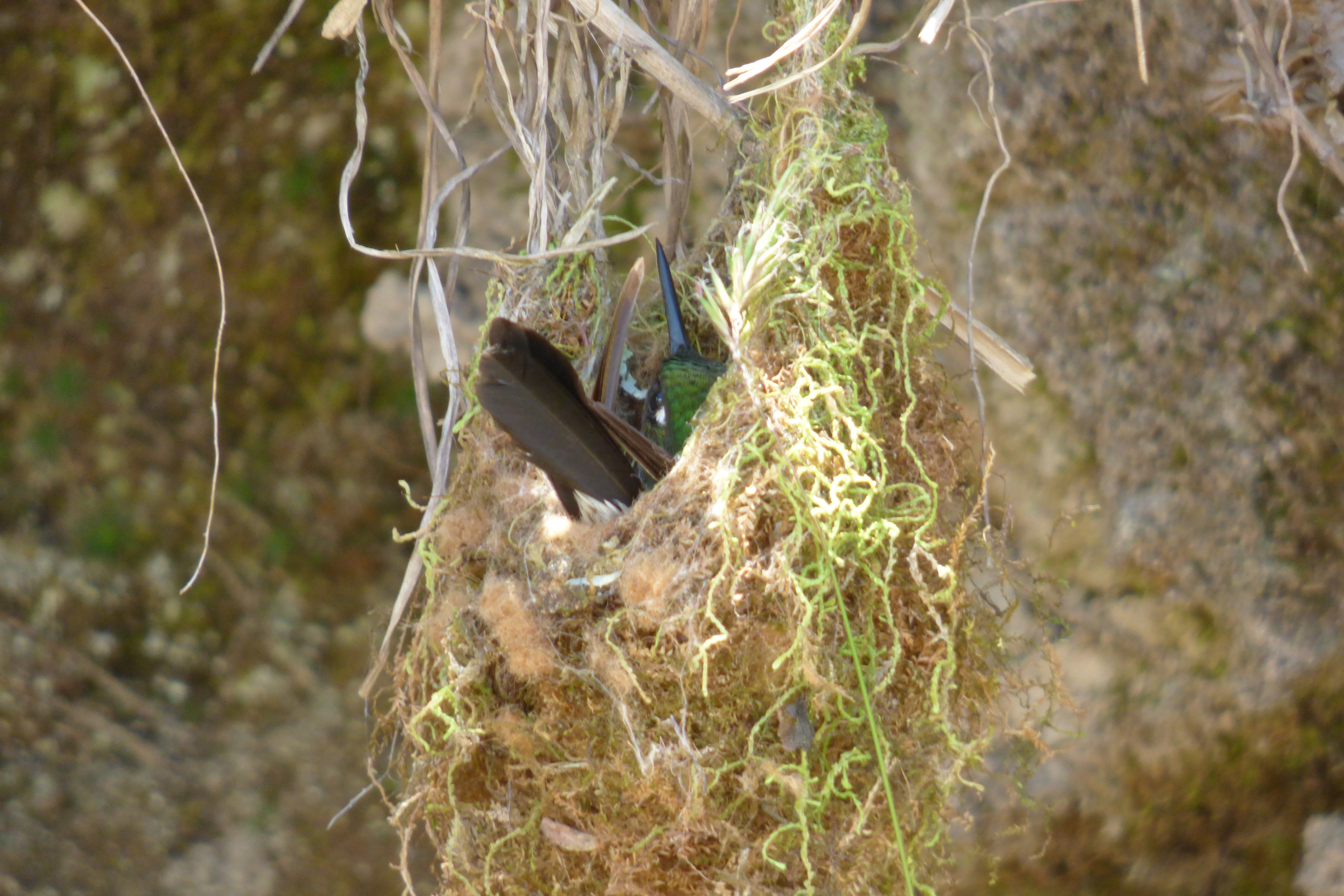 Eriocnemis mosquera (Paramero áureo)